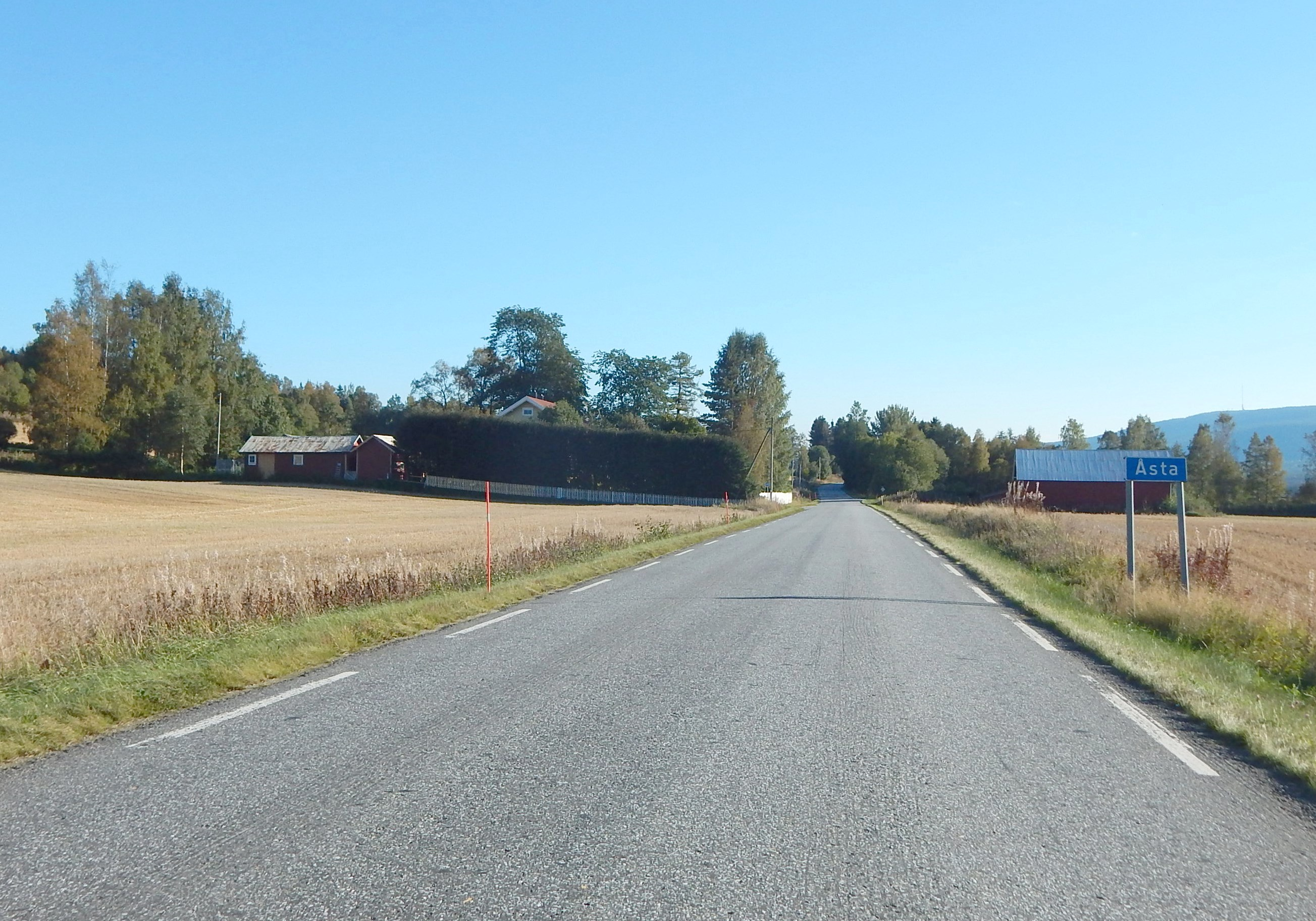 Fylkesvei 535 gjennom Åsta på østsiden av Glomma